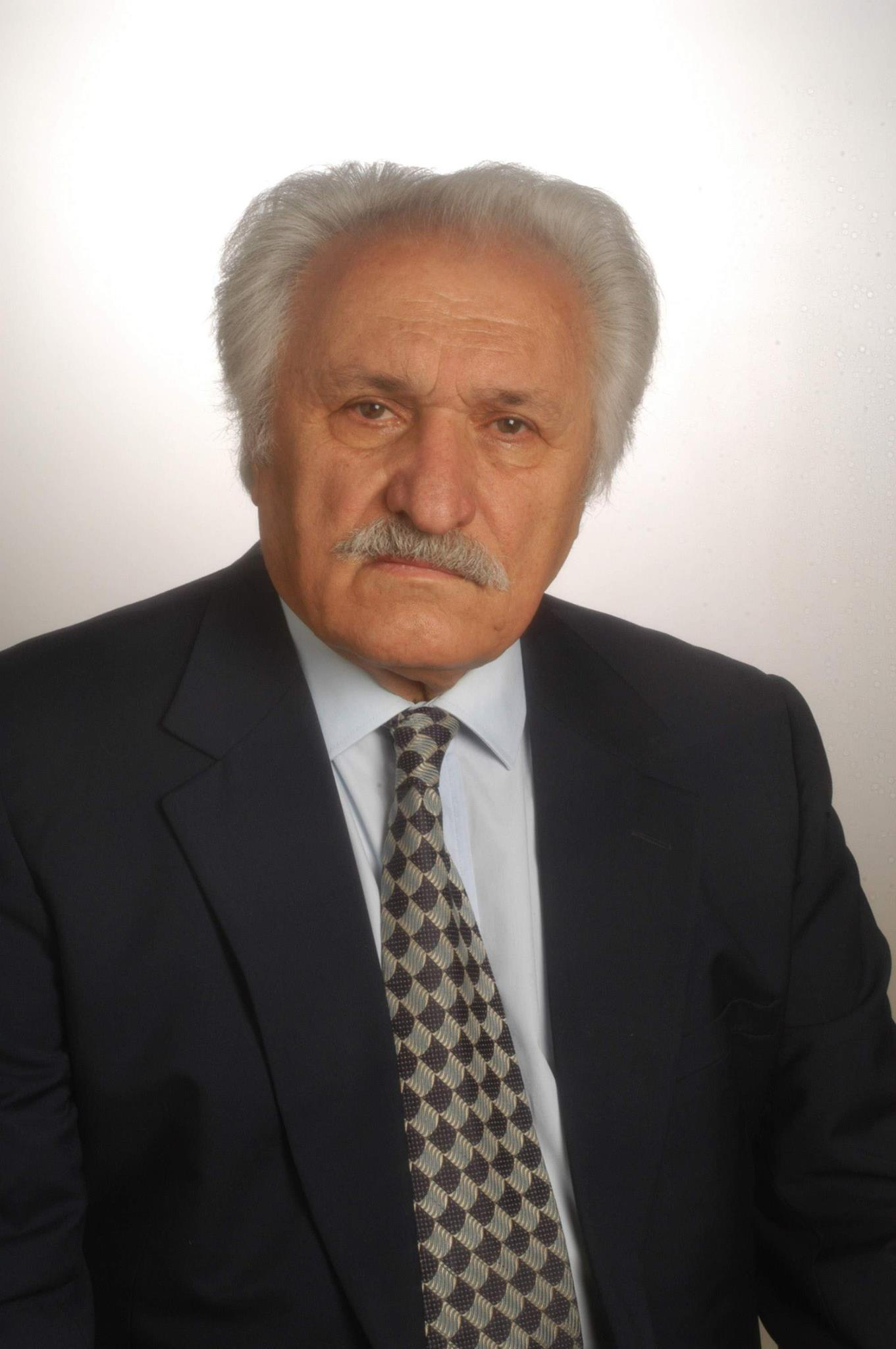 профессор Черкес-Заде Дурсун Исмаилович